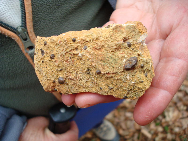 Ein Stück Eisenerz